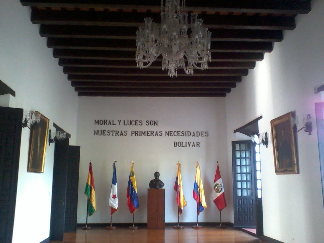 Salón Principal en la Casa del Congreso de Angostura. Ciudad Bolivar, Venezuela